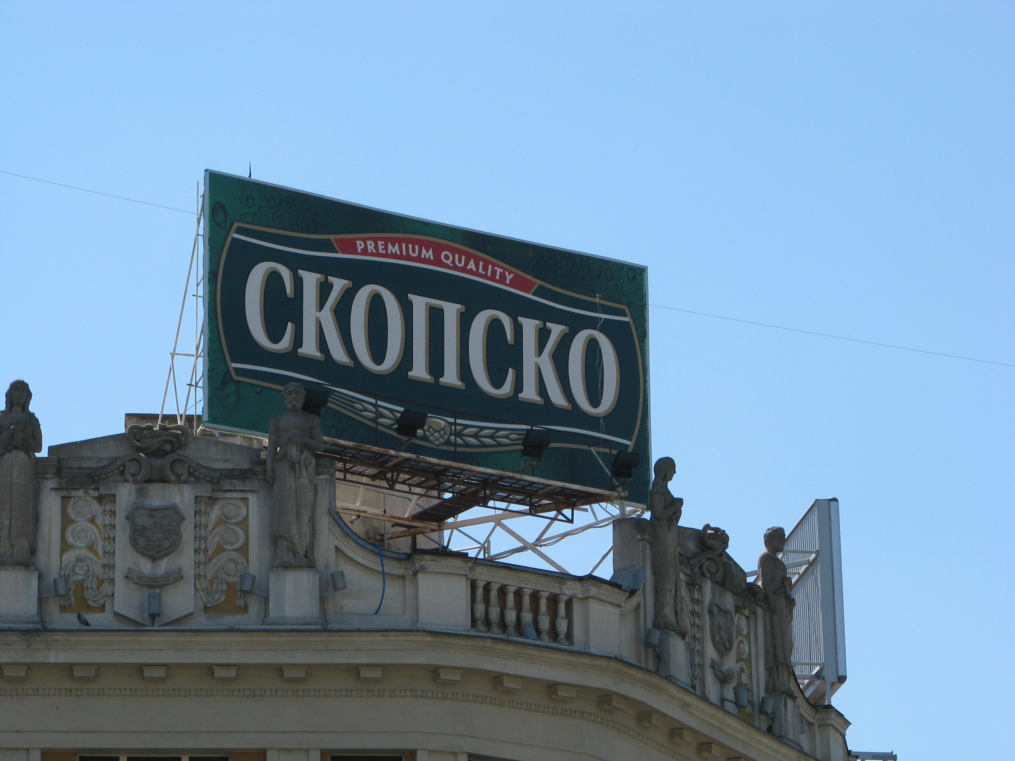 Ristiḱ Palace, Skopje